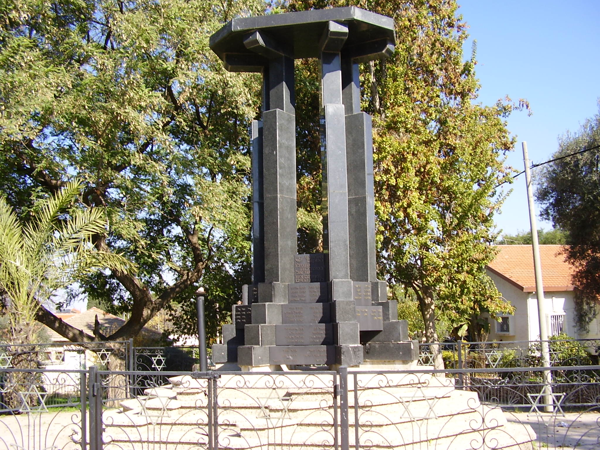 memorial to fallen soldiers, gedera, israel